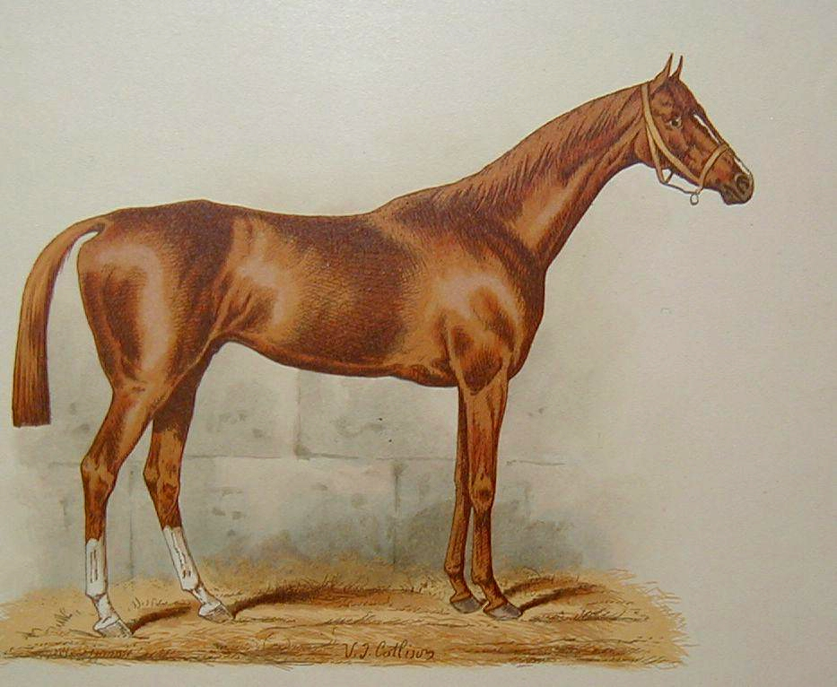 V. J. Cotlison 1890. Kromolitográfia méret: 24x33 cm.